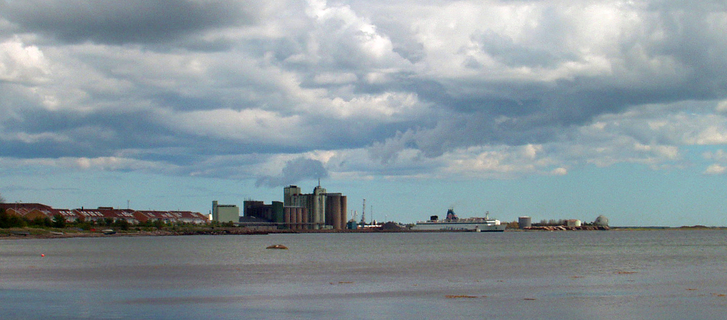 Ystad hamnen och hamninloppet från väst